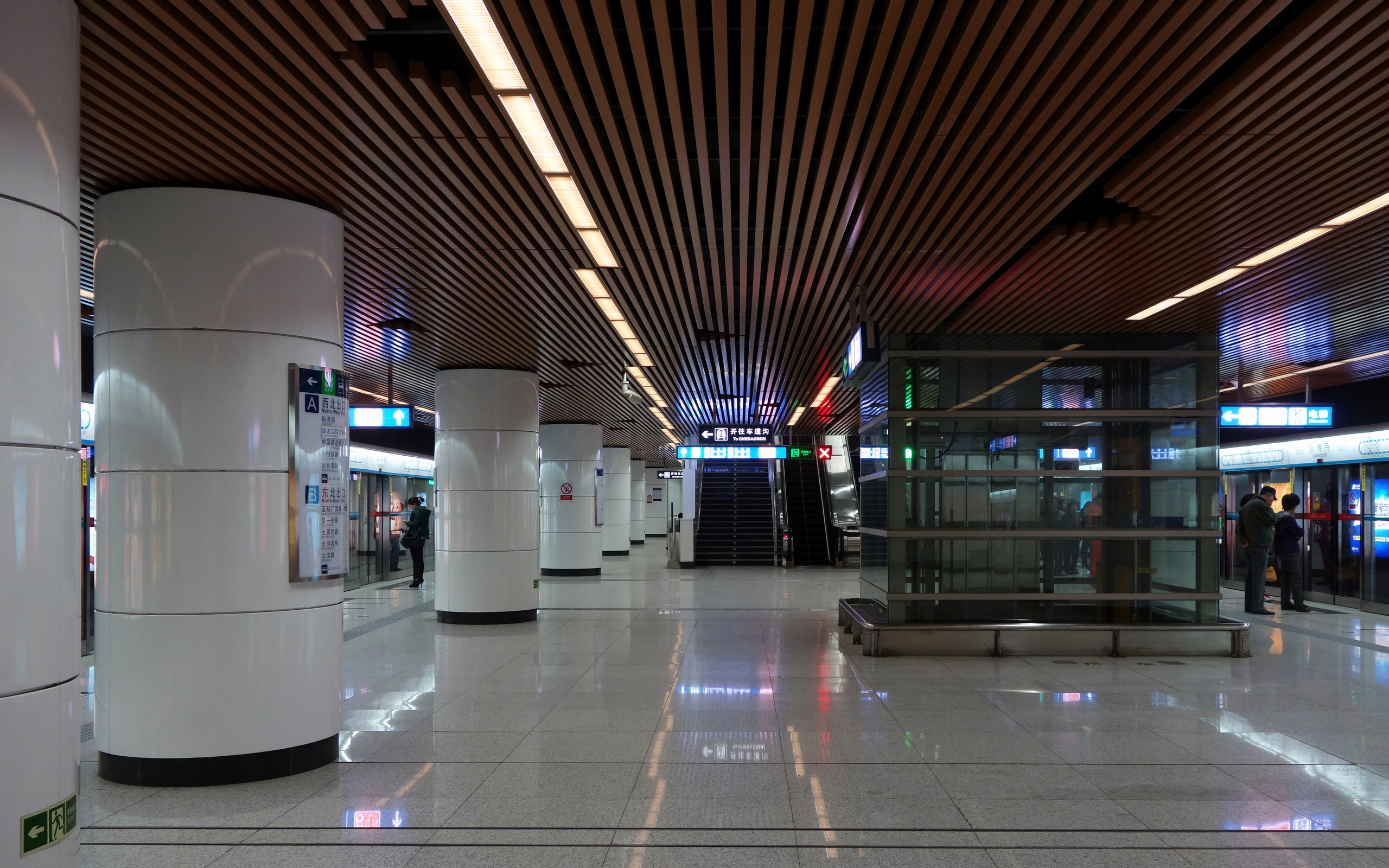 慈寿寺站10号线站台